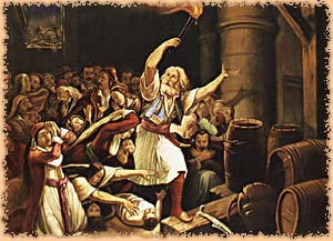 Theodoros Vryzakis : La mise à feu de la réserve de poudre à Missolonghi. Musée municipal de Missolonghi